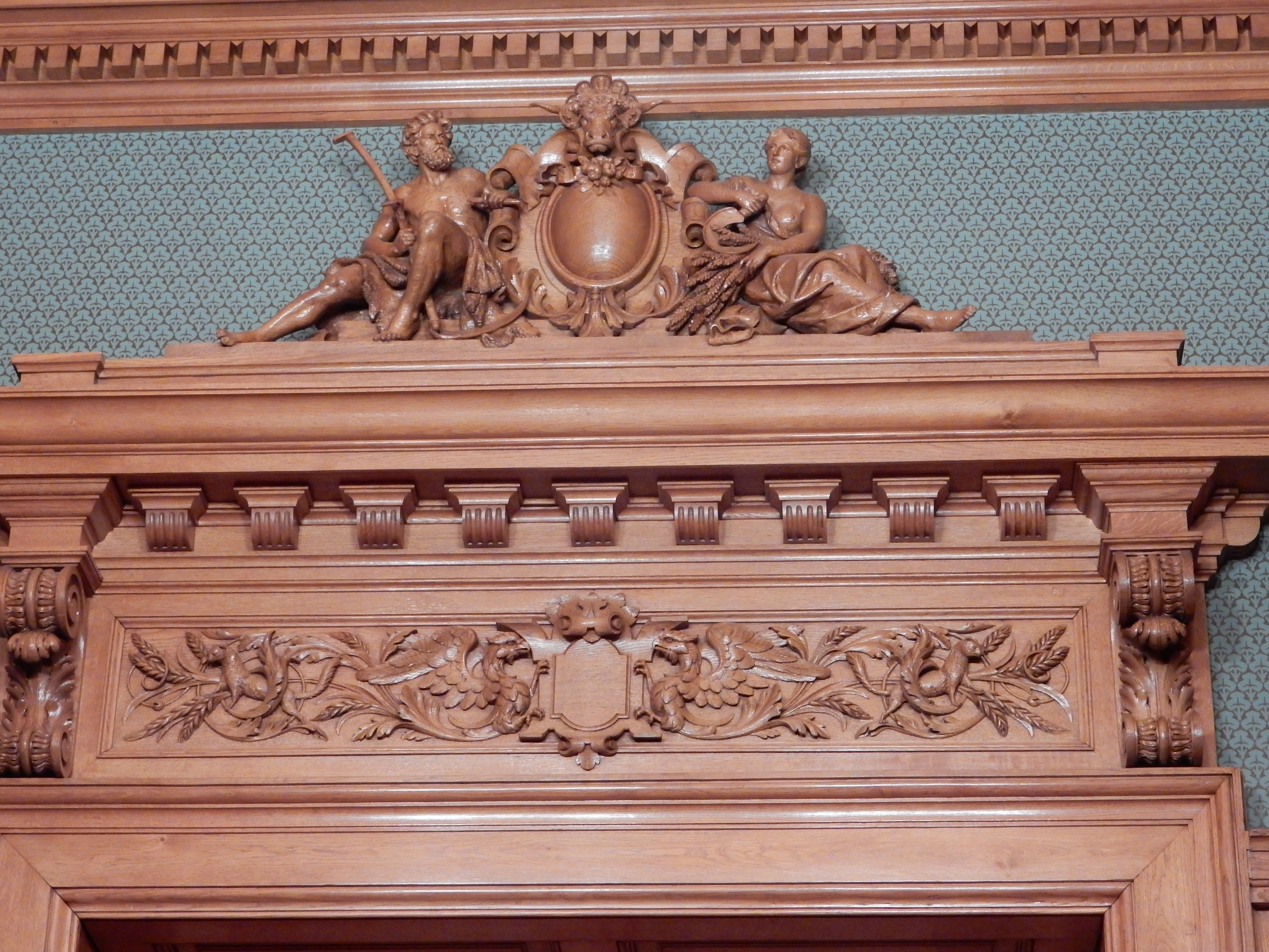 Brienzer Zimmer im Bundeshaus (Bern/Schweiz): Holzschnitzerei über einem Türrahmen